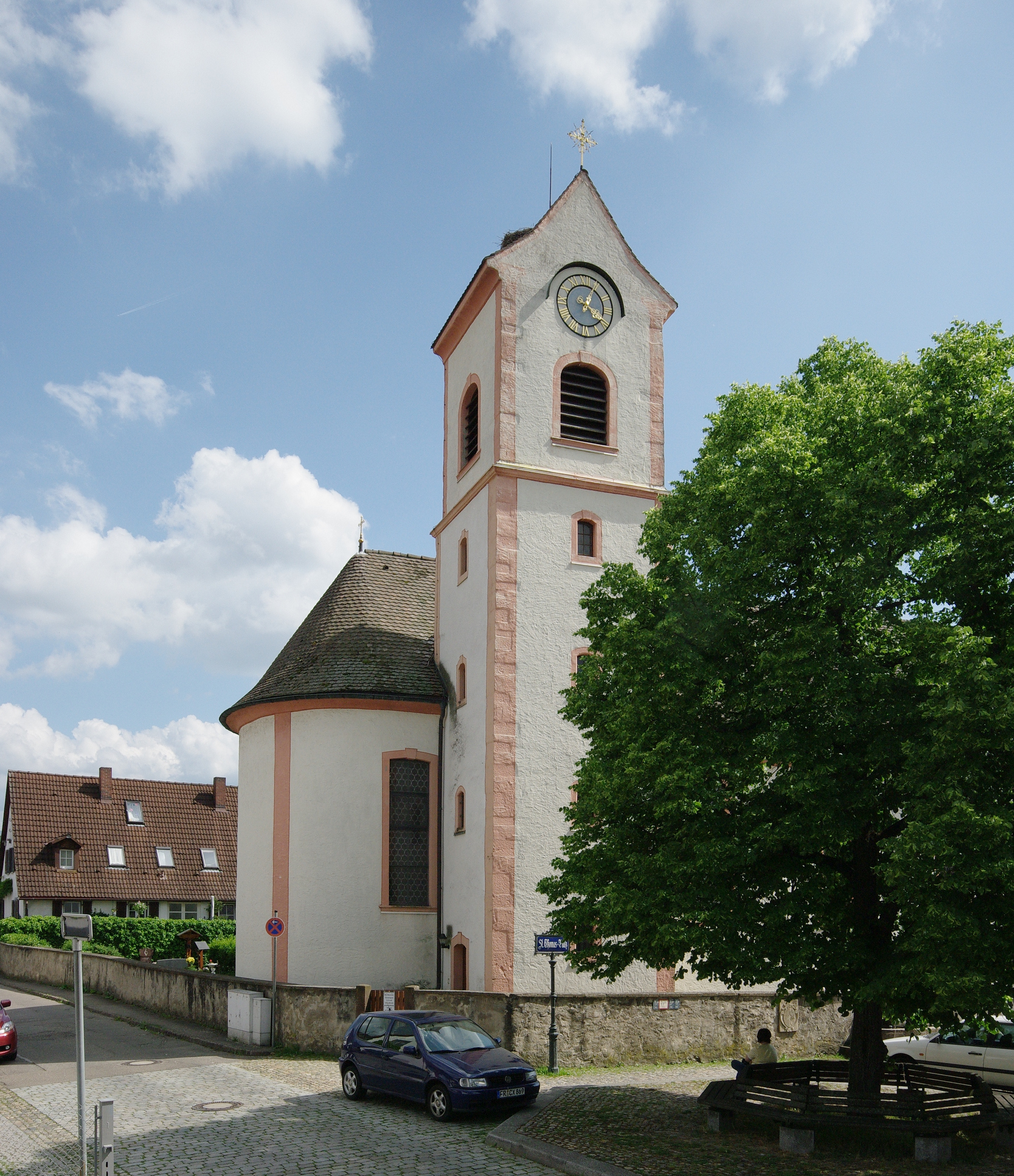 Pfarrkirche St. Thomas in Betzenhausen ein Stadtteil Freiburgs Blick auf den Kirchenturm von Nordwesten